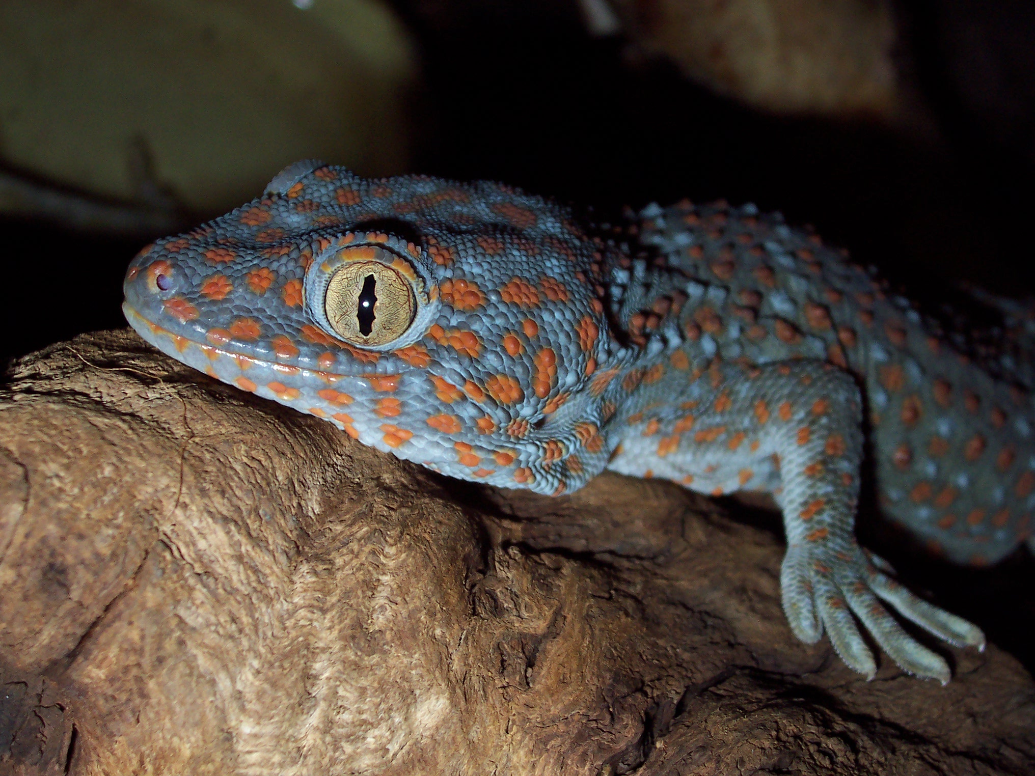 Gekko gecko